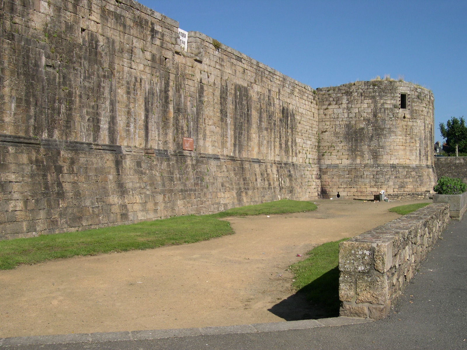 Vue depuis le parking au dessus de la rue du grand trotrieux